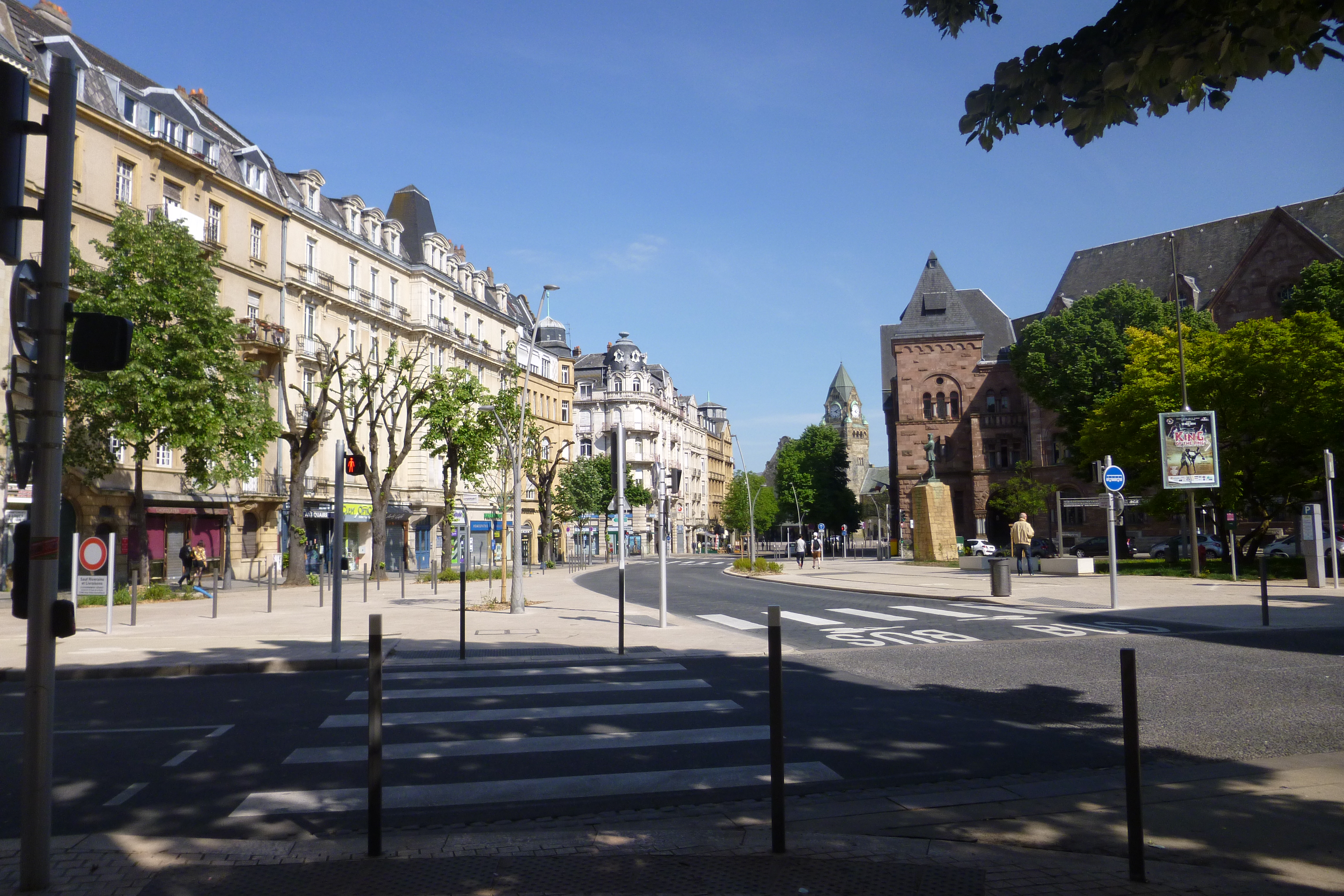 Place Mangin, du quartier impérial de Metz. Vue sur la poste centrale et la gare.